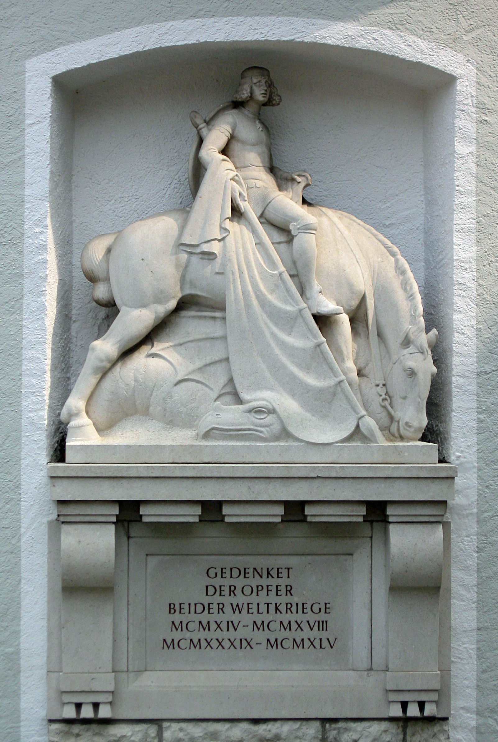 Dorfstraße 18; Kath. Pfarrkirche Hl. Kreuz; Kriegerdenkmal, halboffener Rundbau mit Zeltdach, Reiterelief, Marmorschale und Inschrift, 1957. Skulptur von Emil Hipp.